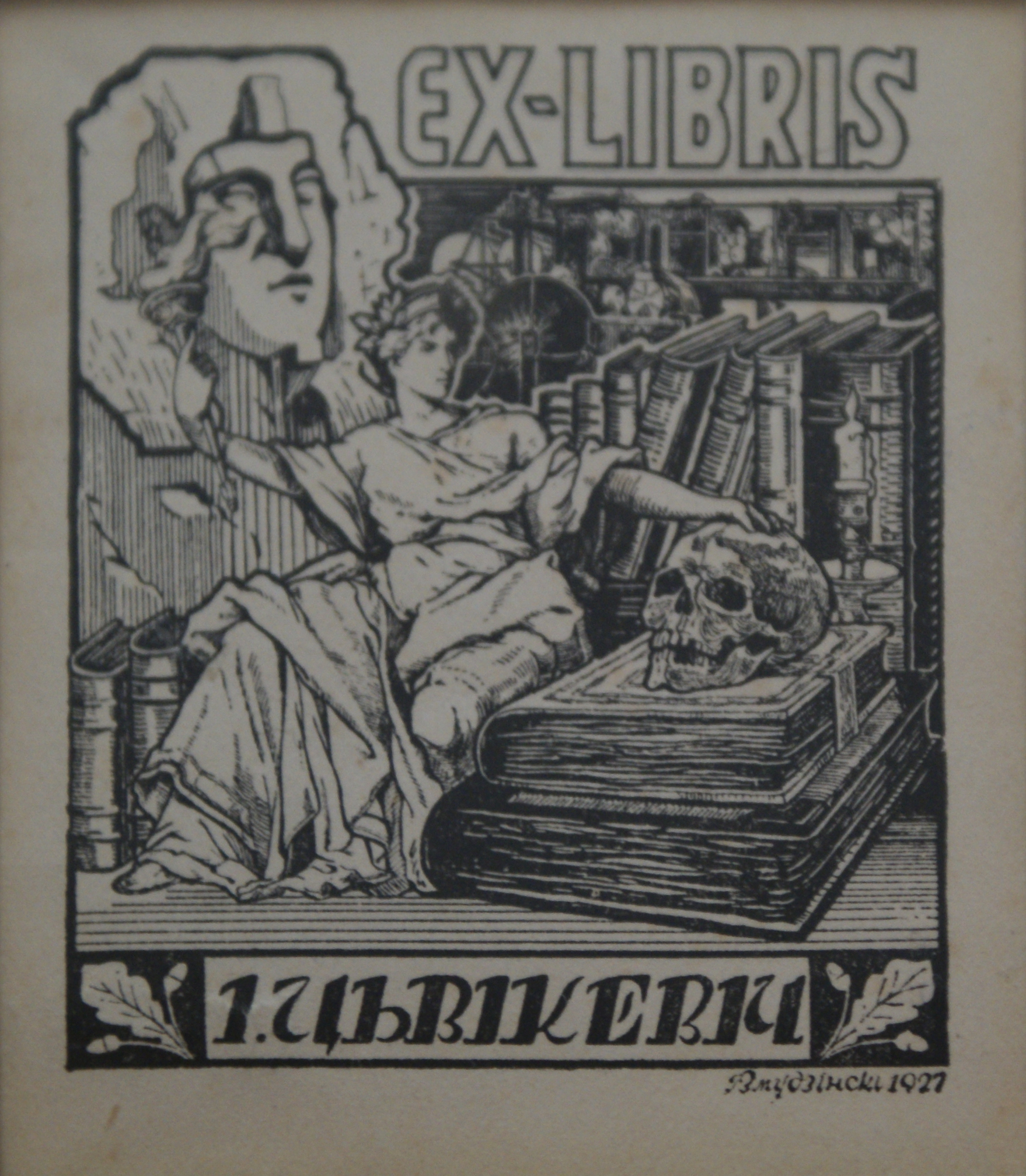 Экслібрыс І. І. Цвікевіча. Папера, цынкаграфія